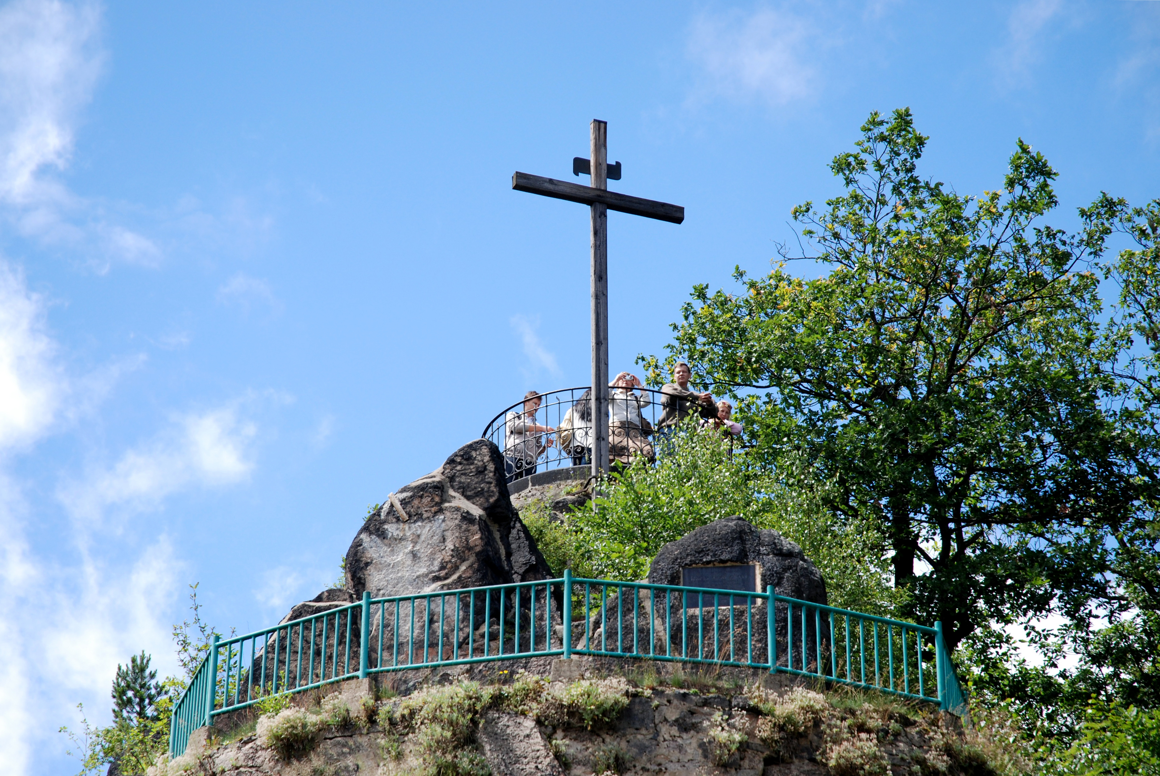 Petrova vyhlídka v Karlových Varech, pohled z Mayerova glorietu